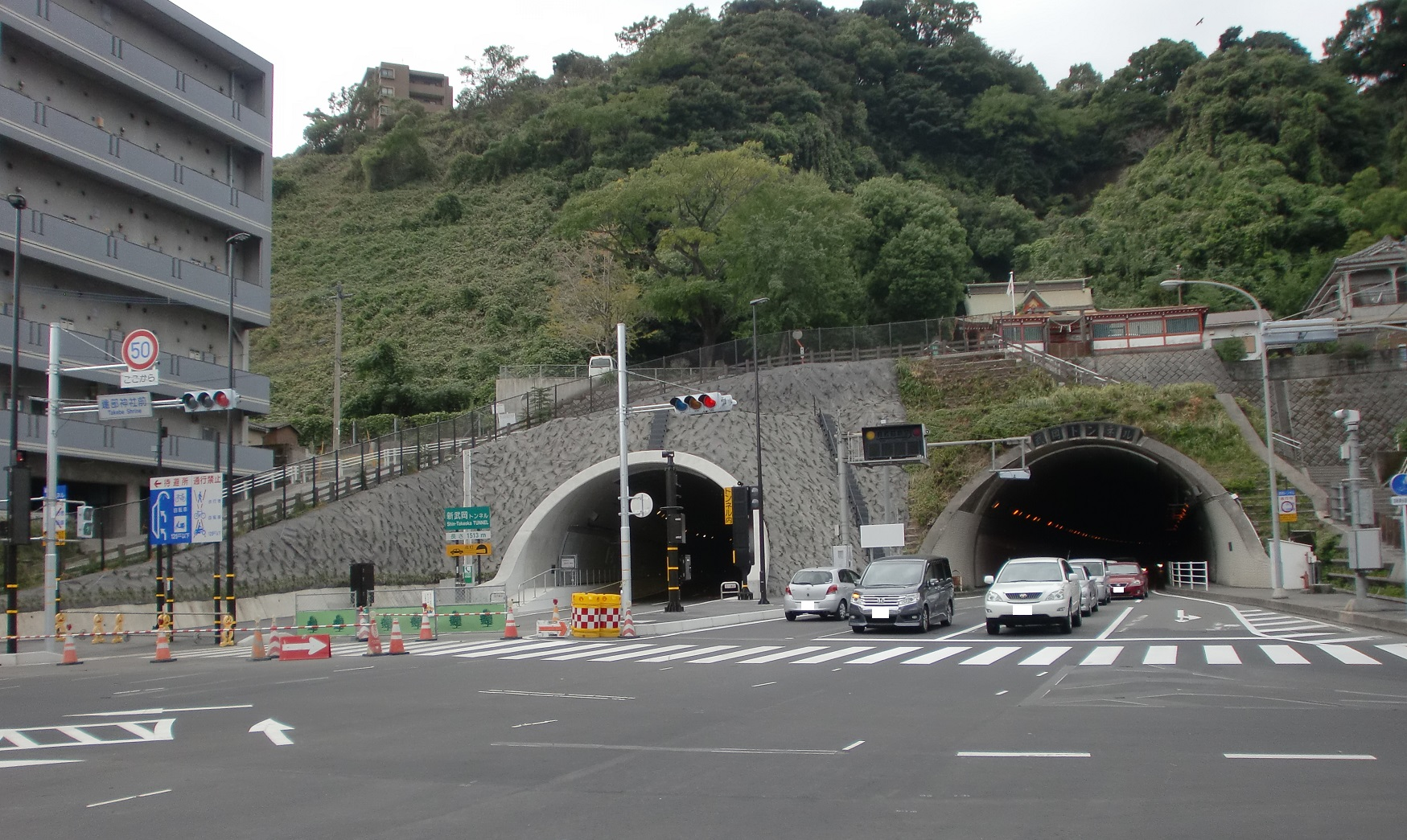 供用開始前の新武岡トンネルと片側通行となる前の武岡トンネル。